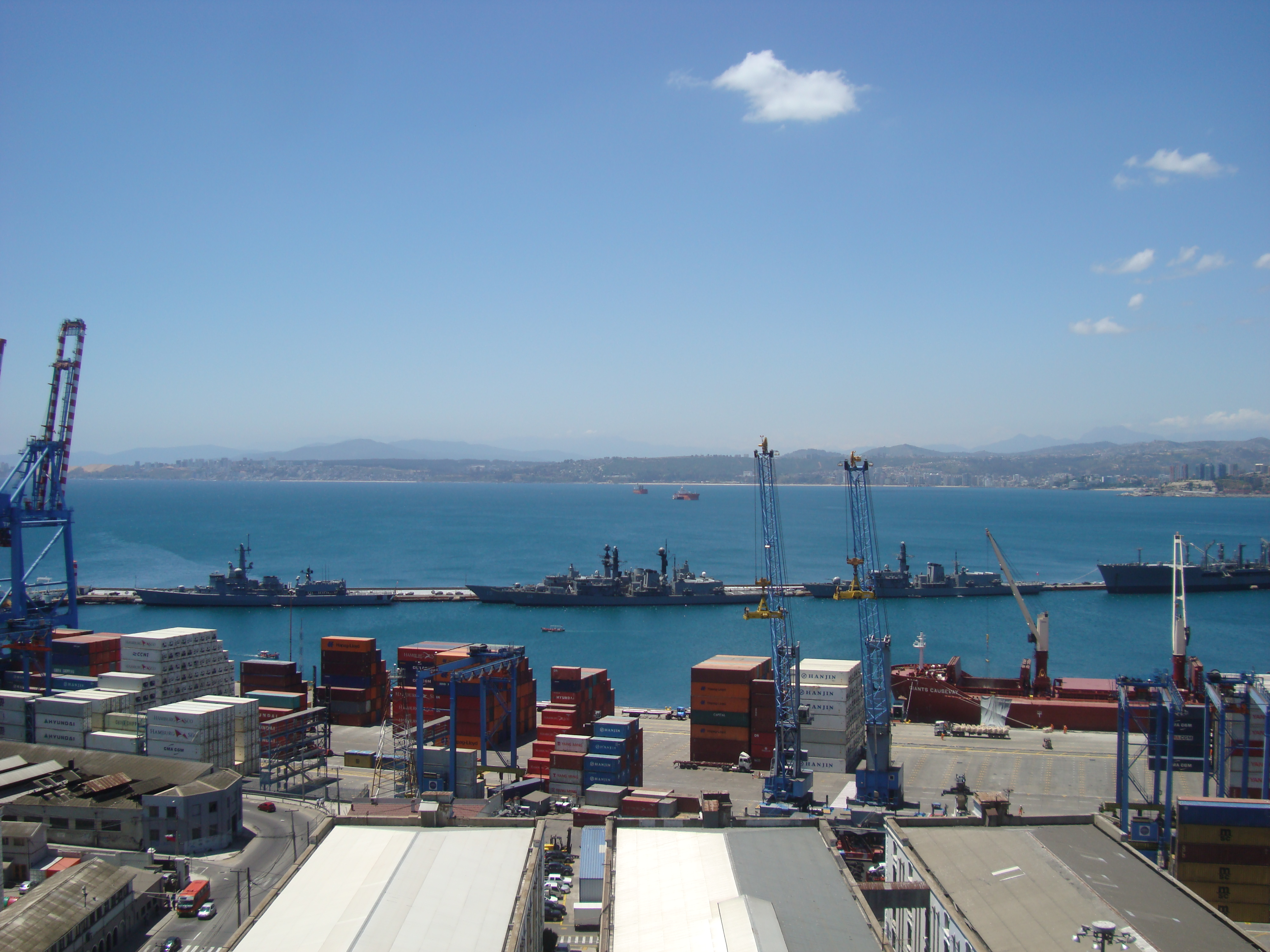 Molo de abrigo en Valparaiso